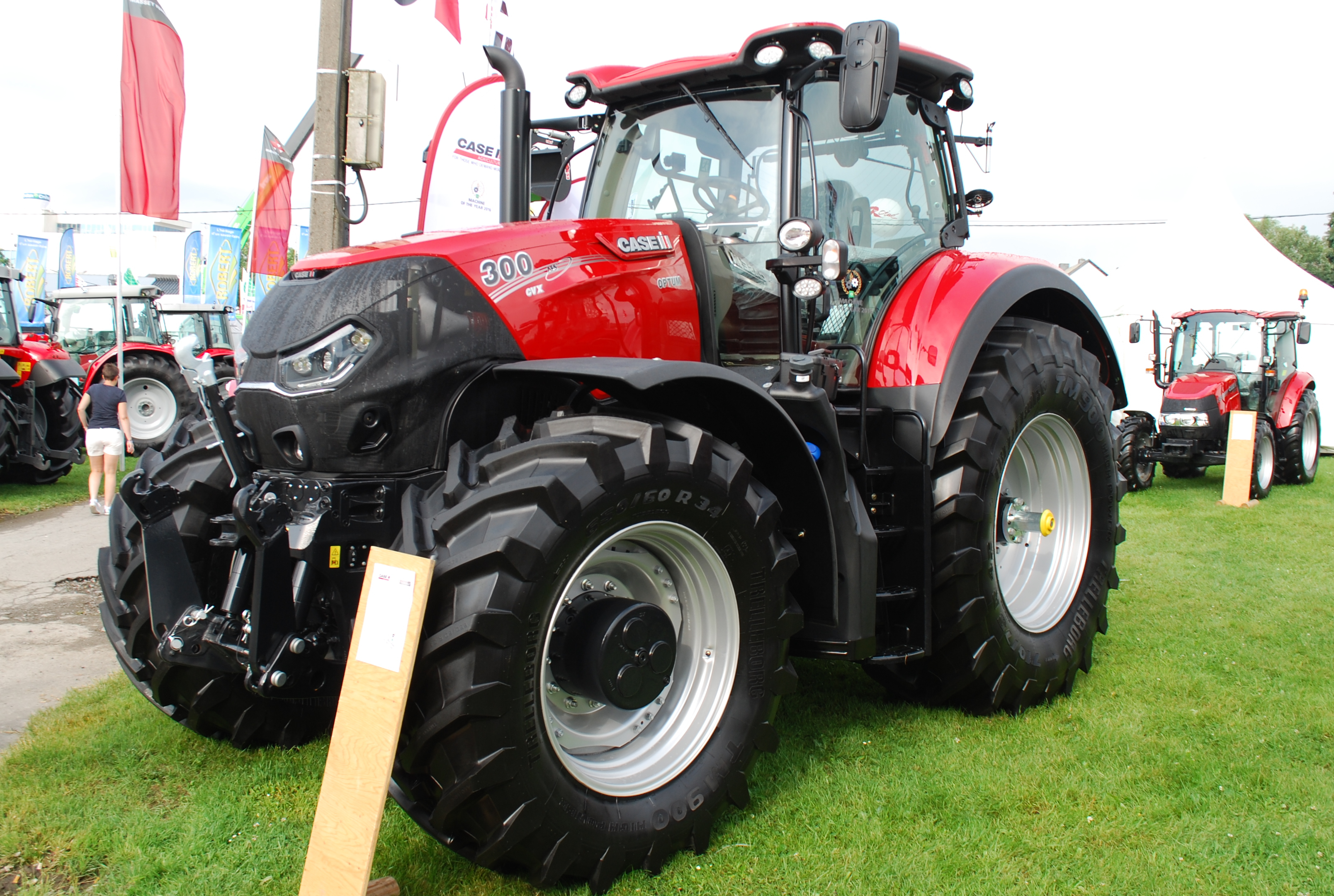 Vue de la Foire agricole de Libramont, dans le Luxembourg belge (82e édition en 2016).